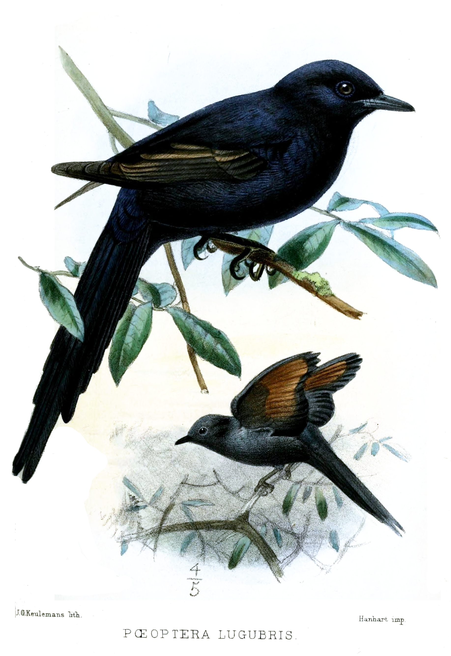 Poeoptera lugubris